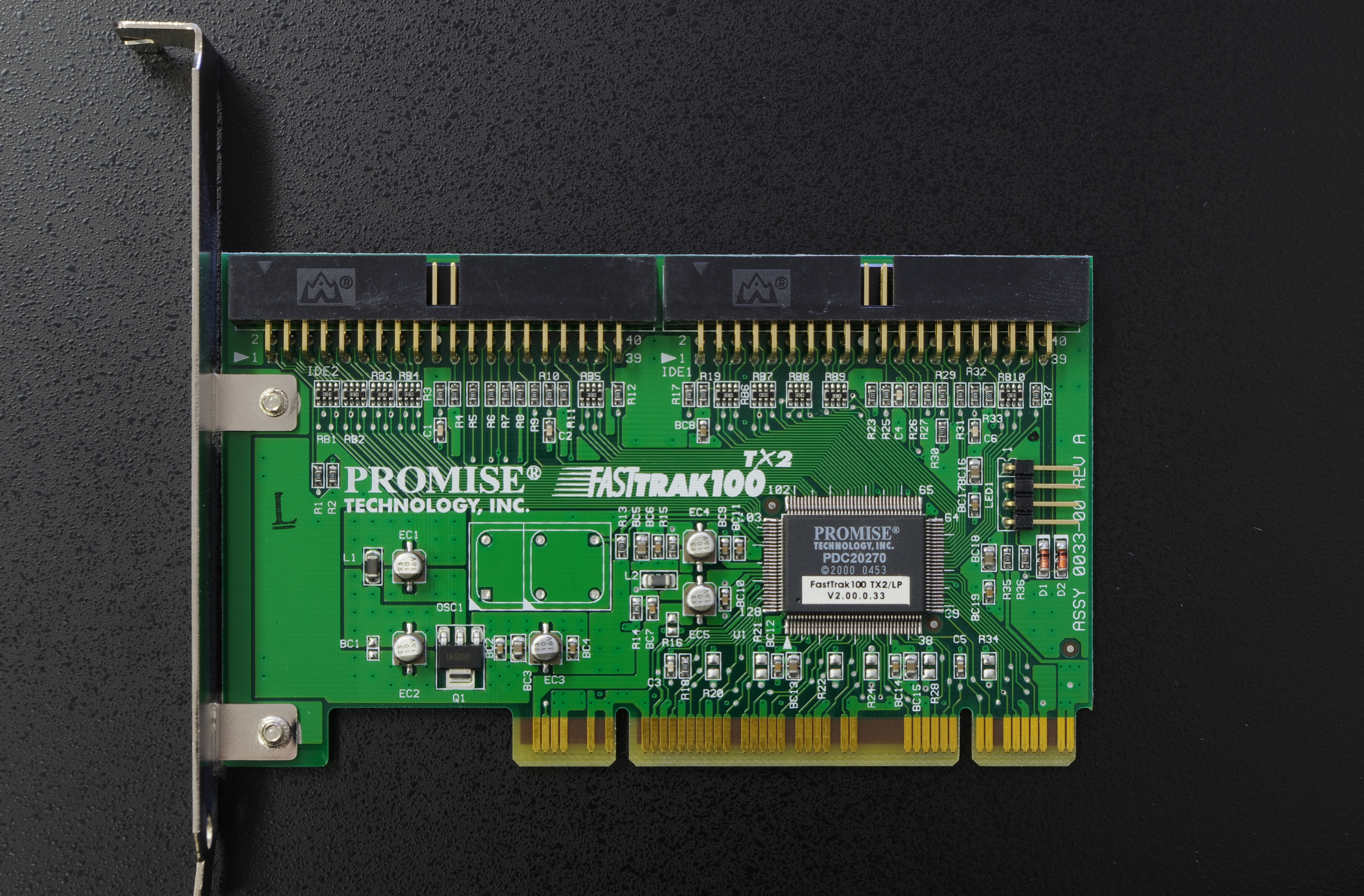 ATA-Controller